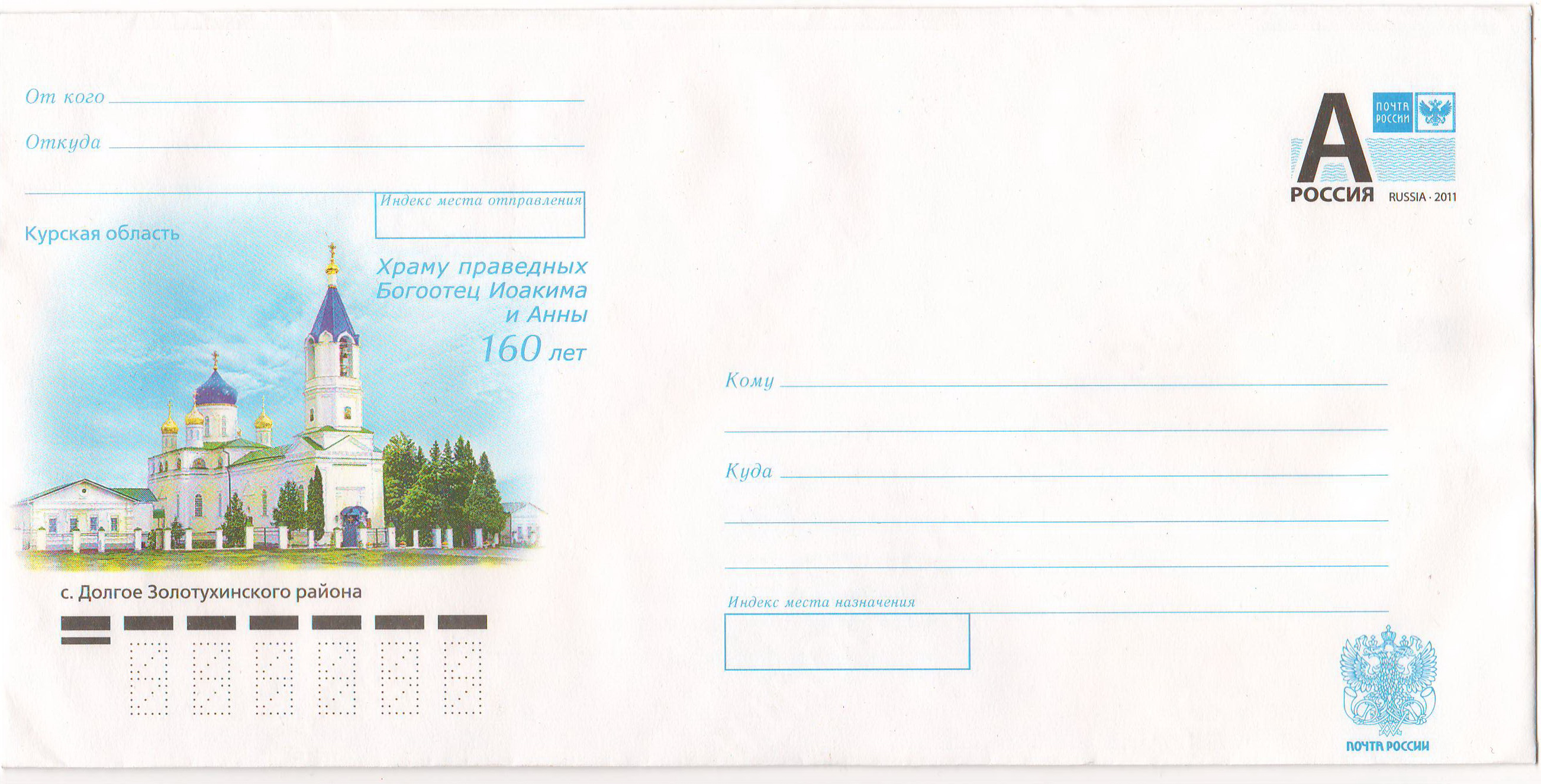 Почтовый конверт России — 160 лет церкви Иоакима и Анны в селе Долгое Золотухинского района Курской области